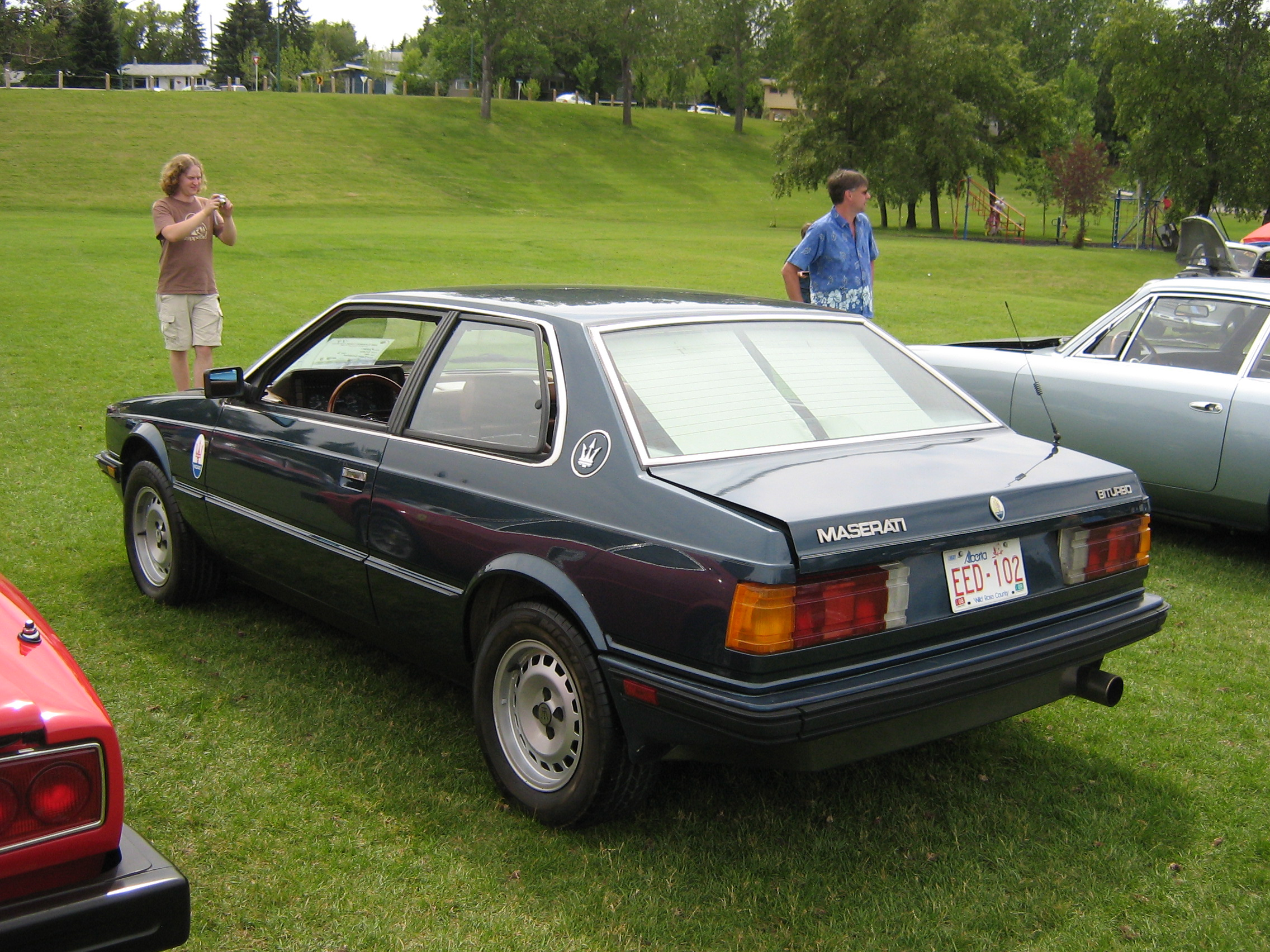 1984 Maserati Biturbo